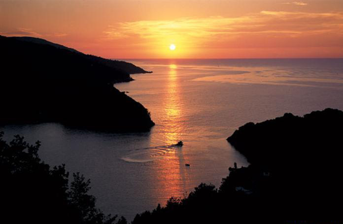 Cide Gideros Koyu